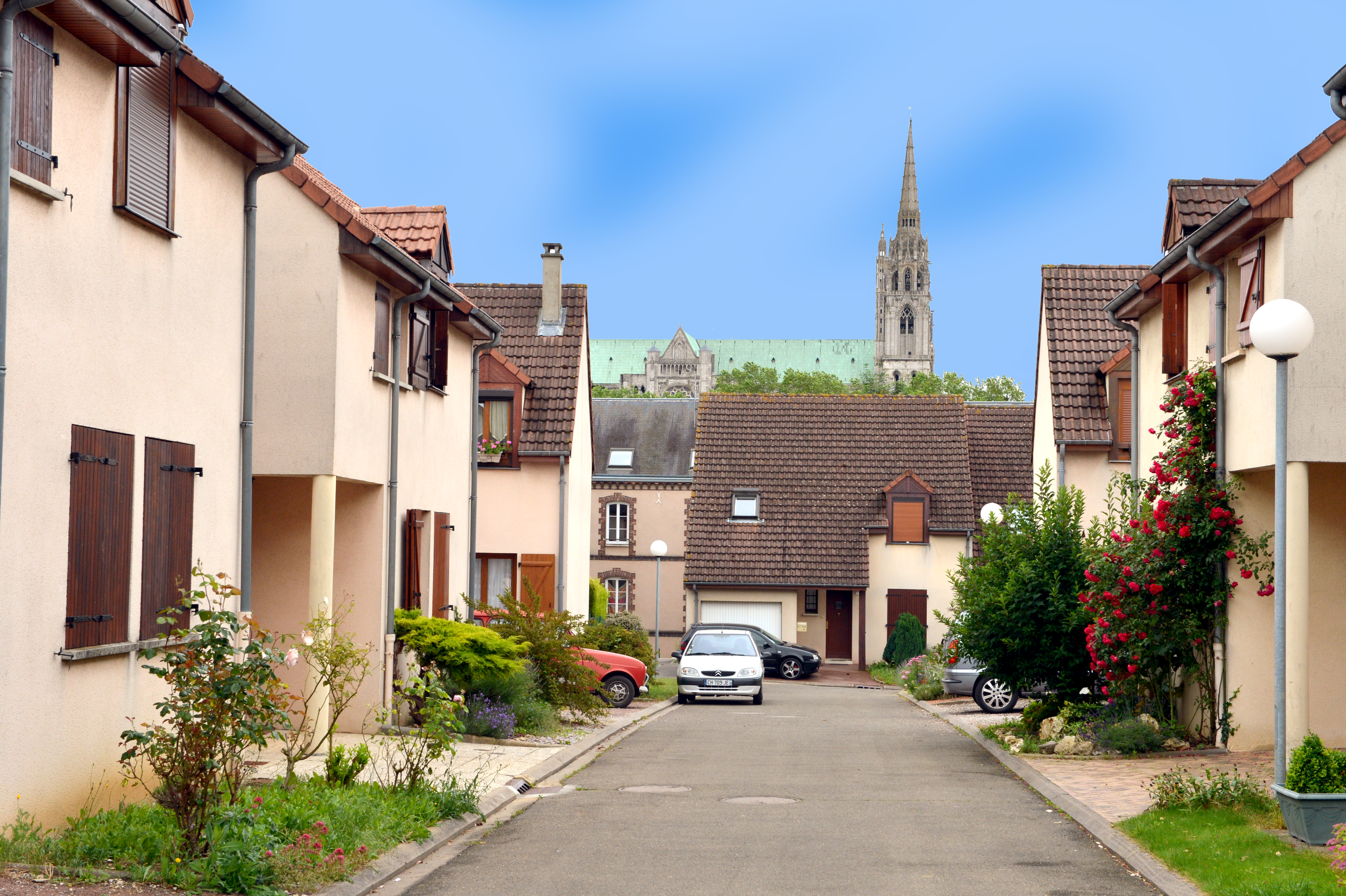 maisons de Chartres, Eure-et-Loir, France.